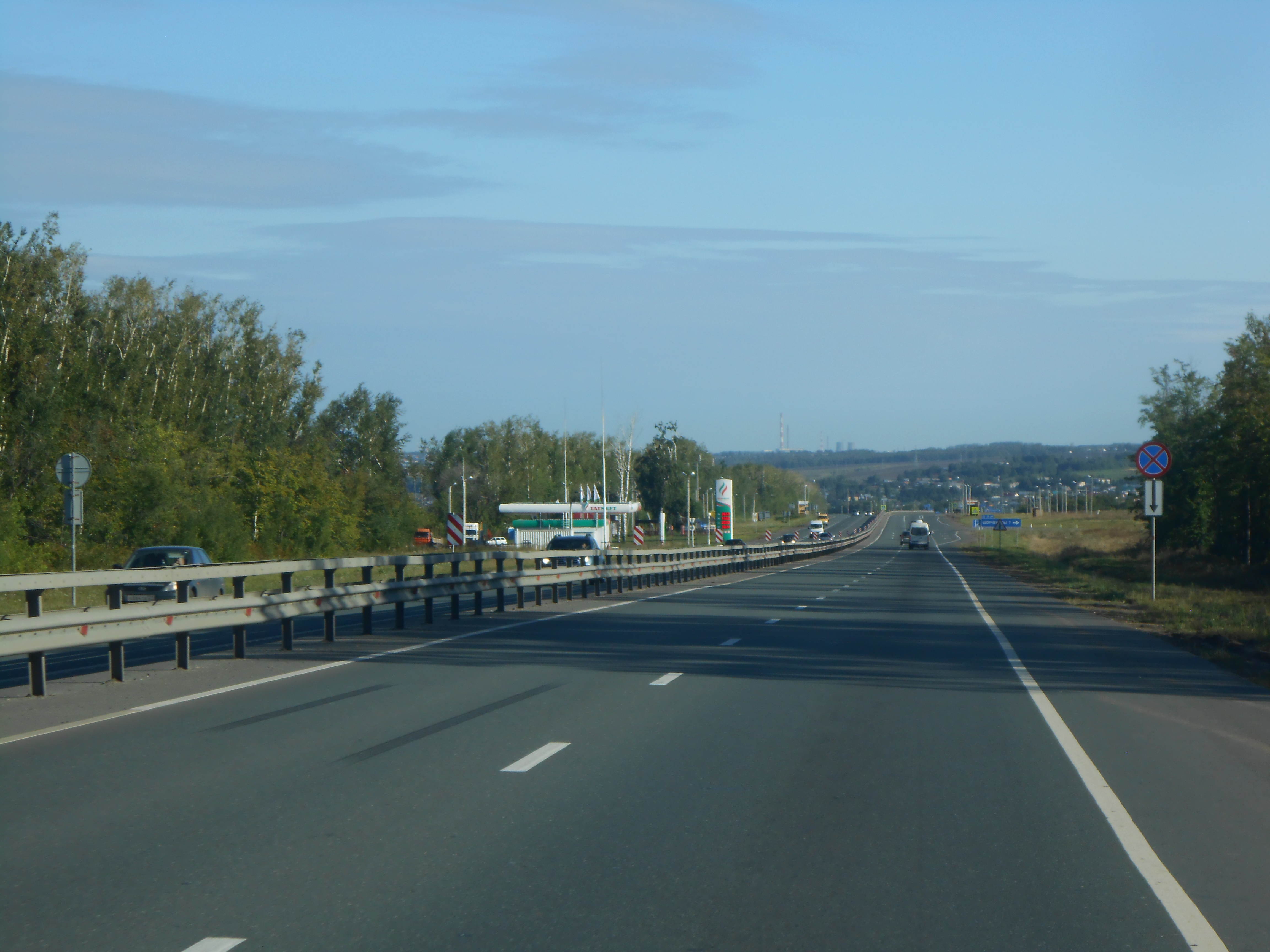 Route M7